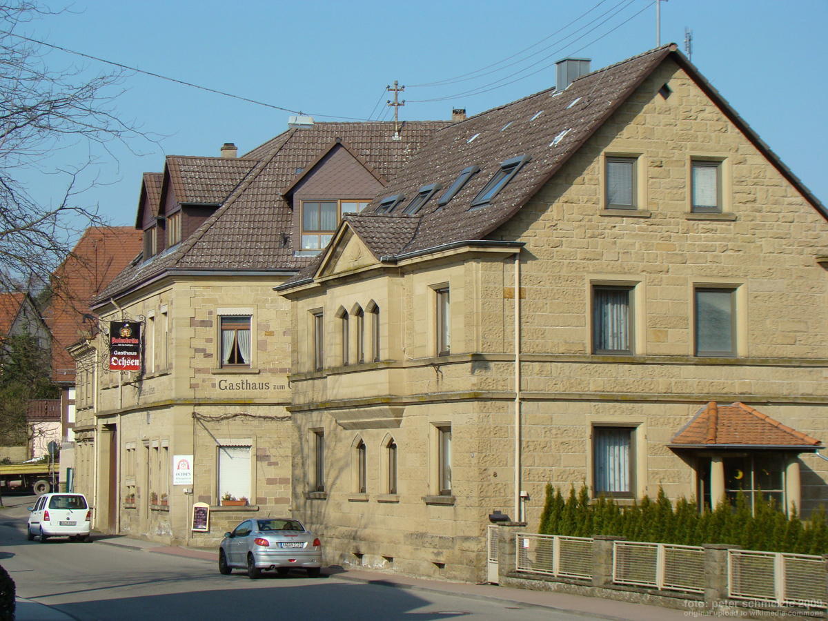 Sandsteingebäude in Eppingen-Mühlbach